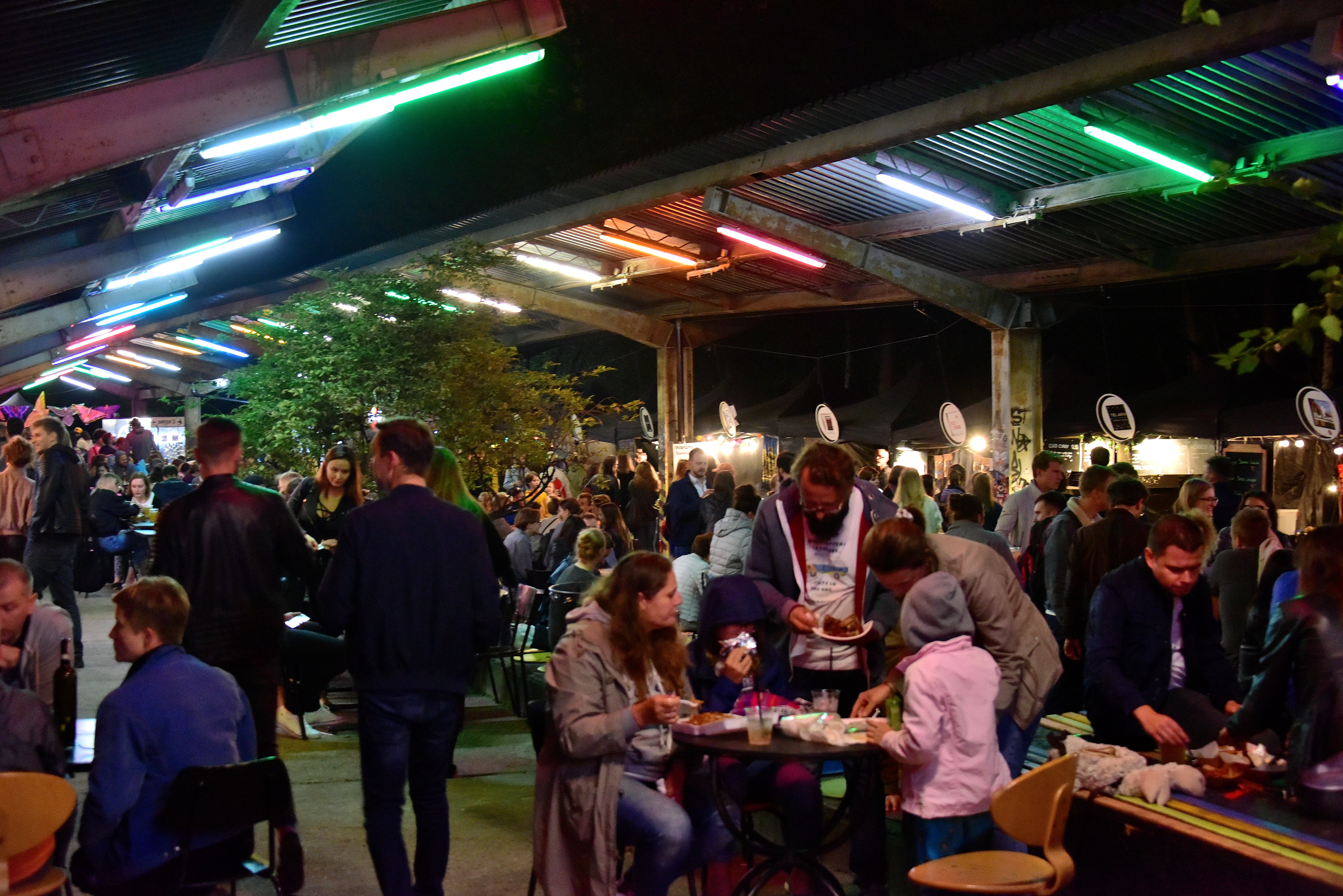 Nocny Market na peronach pocztowych stacji Warszawa Główna